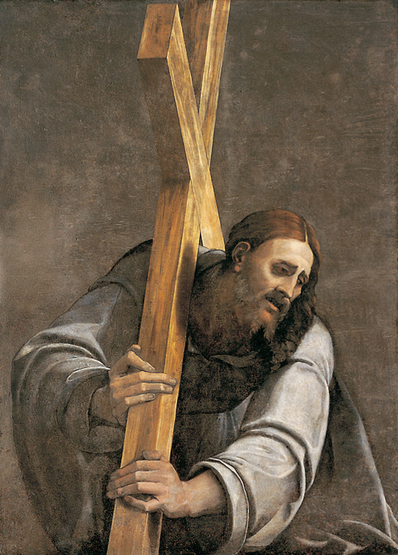 Kreuztragender Christus